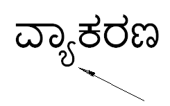 вьякарана, кийяварию